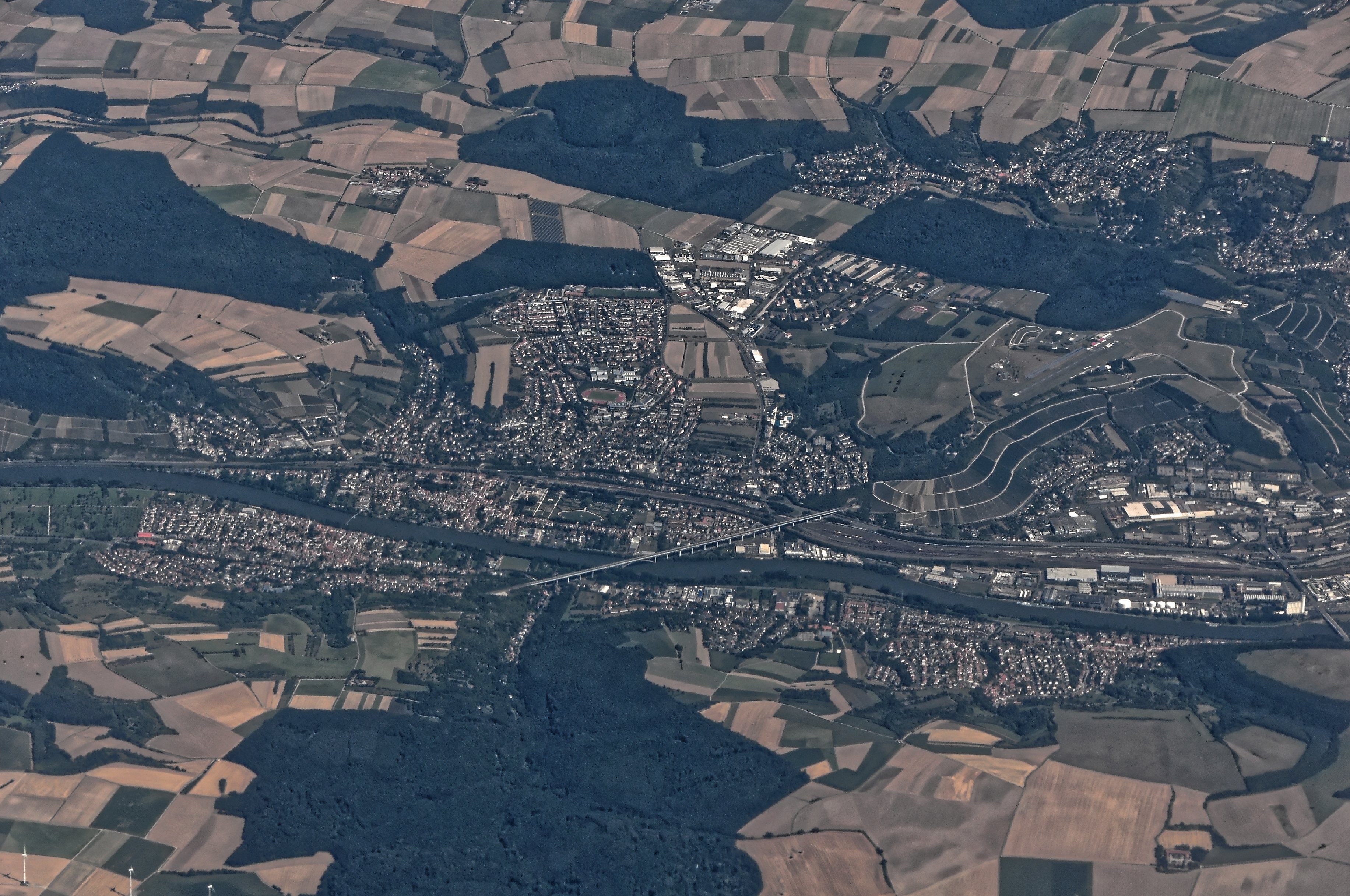 Bilder vom Flug -Rom-Düsseldorf-Hamburg 2013 Dieses Foto entstand in Zusammenarbeit mit Stadtbesichtigungen.de Die Seiten Stadtbesichtigungen.de, der dazugehörige Reise Blog sowie die Facebookseite: Stadtbesichtigungen Rom dürfen dieses Bild für Ihre Veröffentlichungen ohne den Hinweis auf Wikipedia, Commons bzw der Lizenz verwenden. Die Verantwortlichen habe von mir (Ra Boe) die Originaldaten zur freien Verfügung übermittelt bekommen.